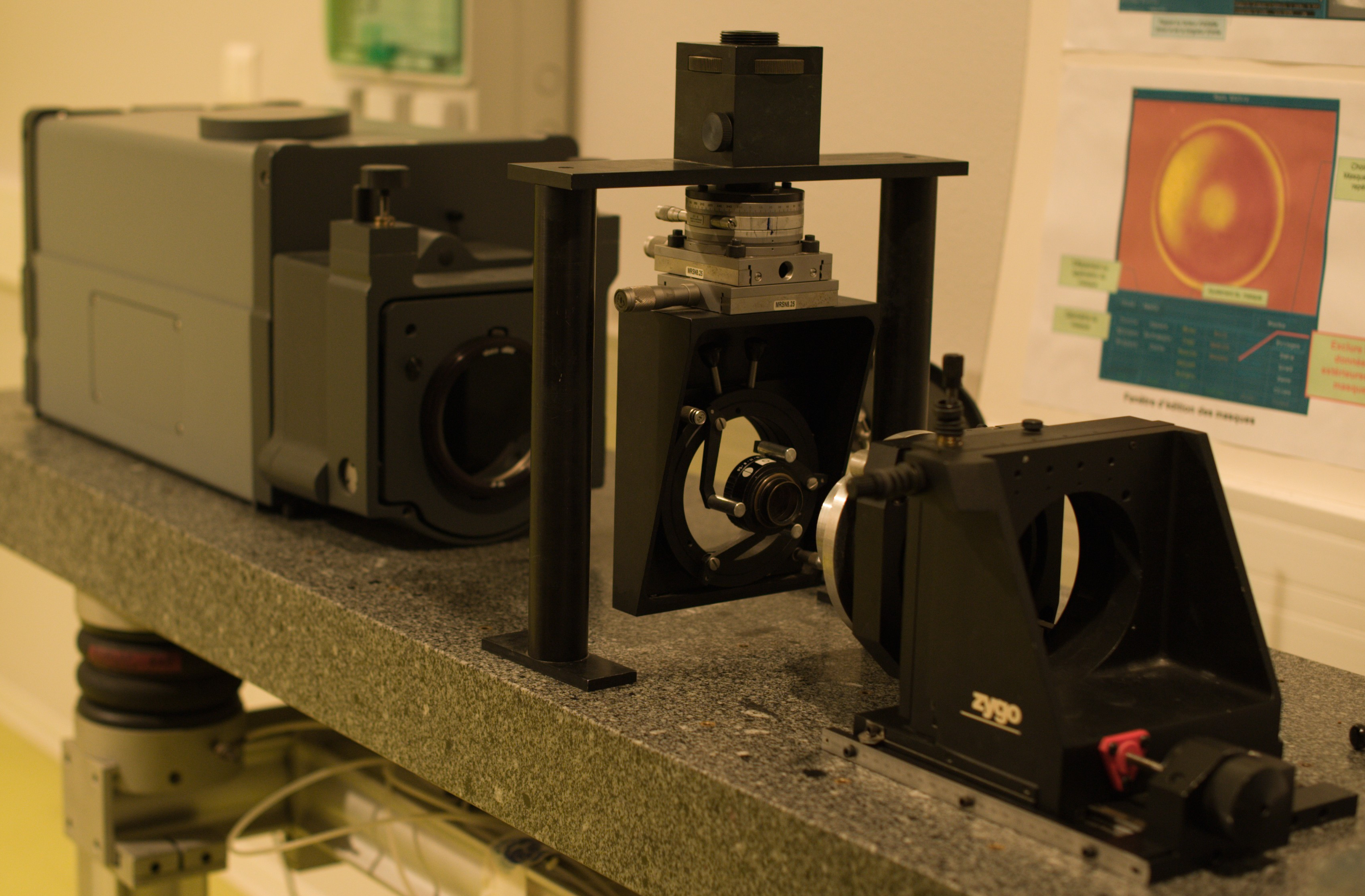 Interféromètre Zygo, Salle TP Supoptique